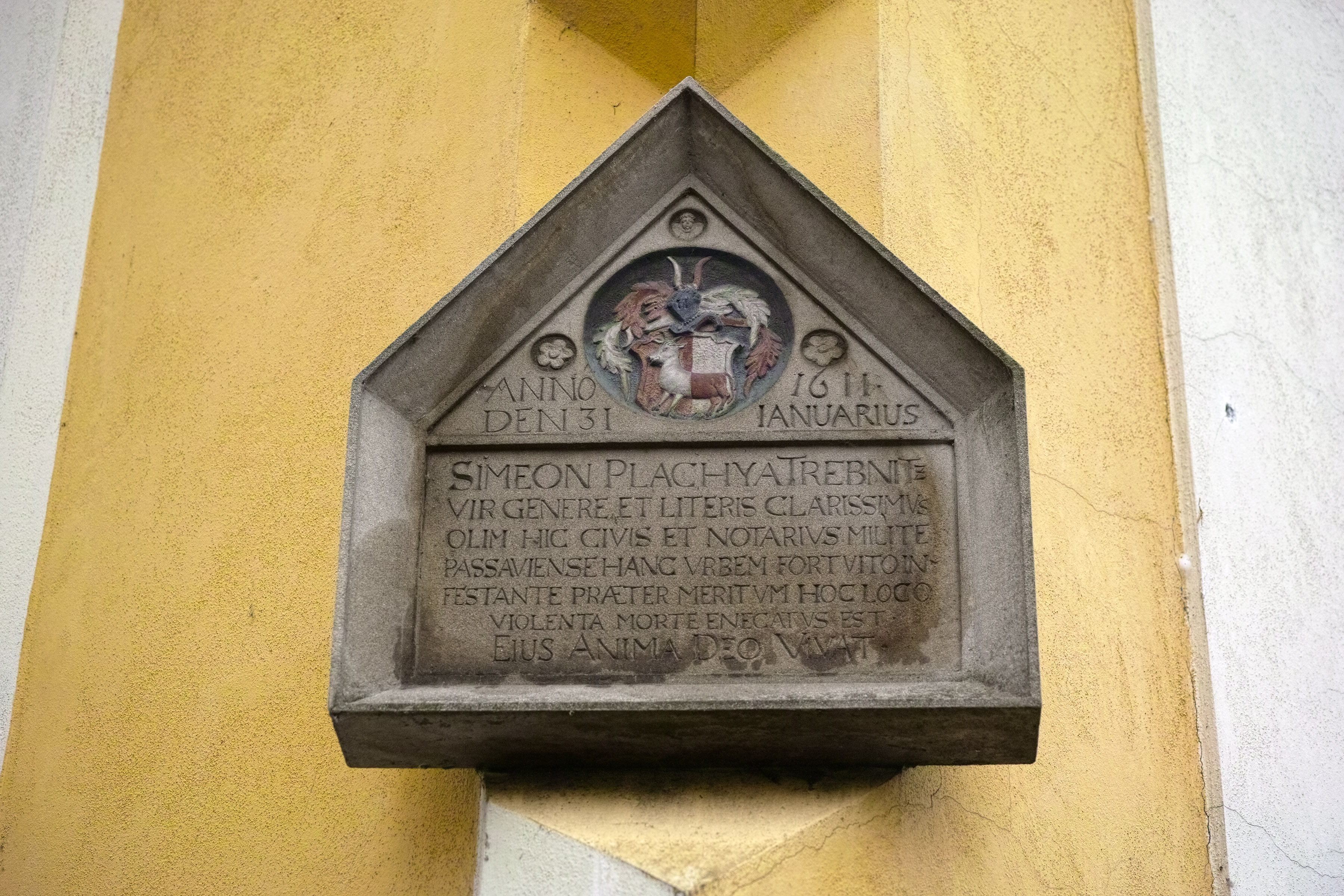 Pamětní deska Šimona Plachého z Třebnice, budějovického písaře zabitého při vpádu Pasovských 1611.